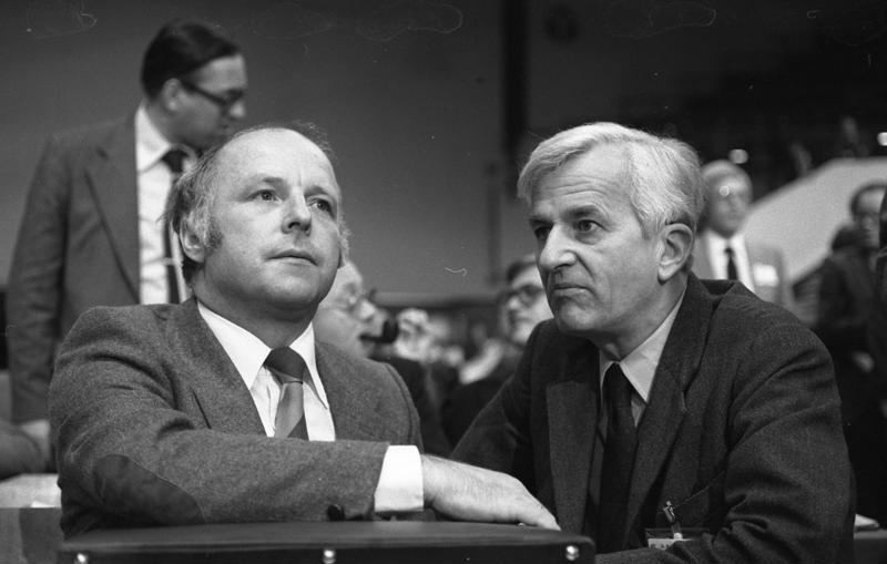 26. Bundesparteitag der CDU in der Friedrich-Ebert-Halle in Ludwigshafen 23.-25.10.1978